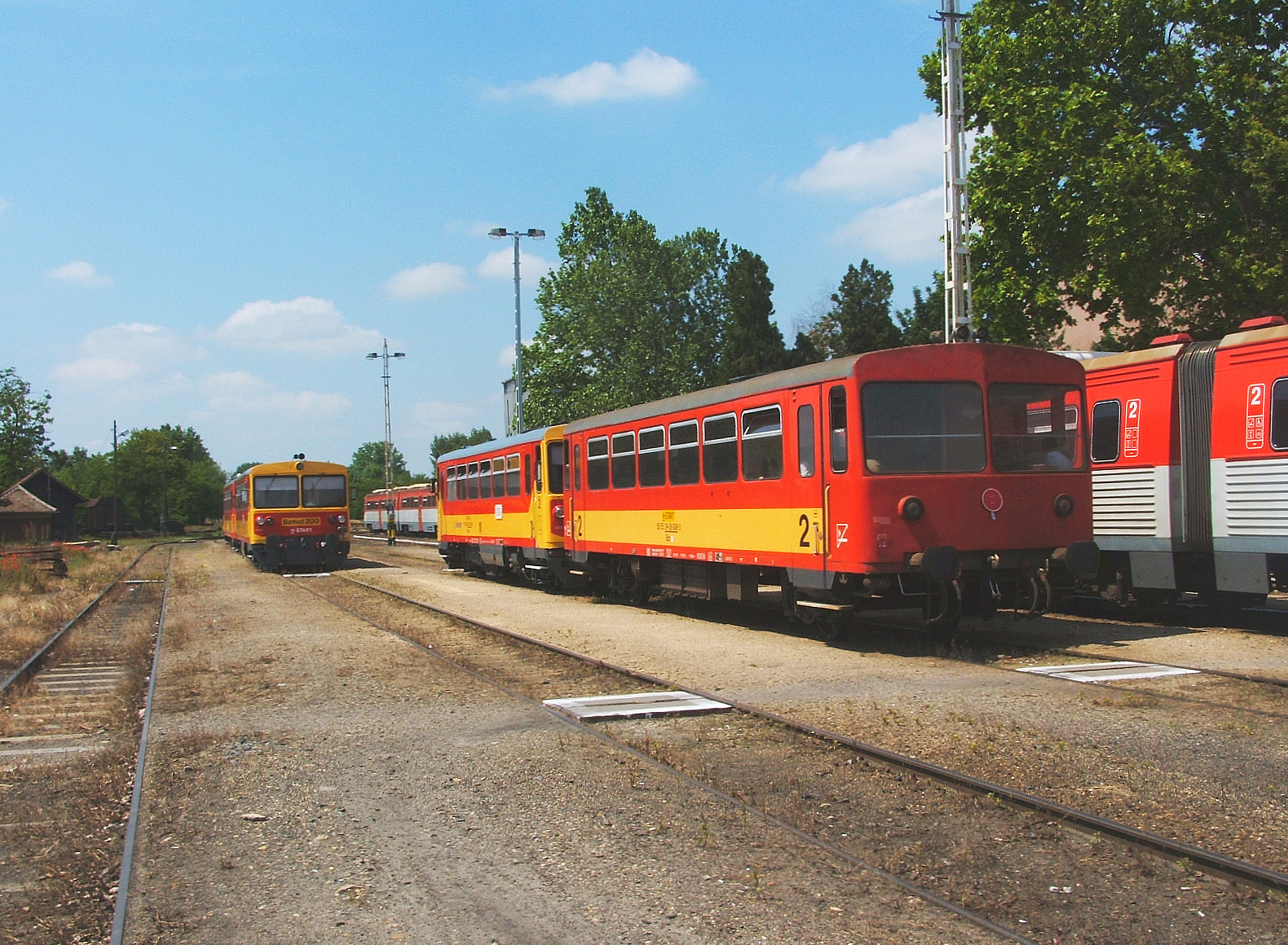 Vonatkereszt Lakitelken